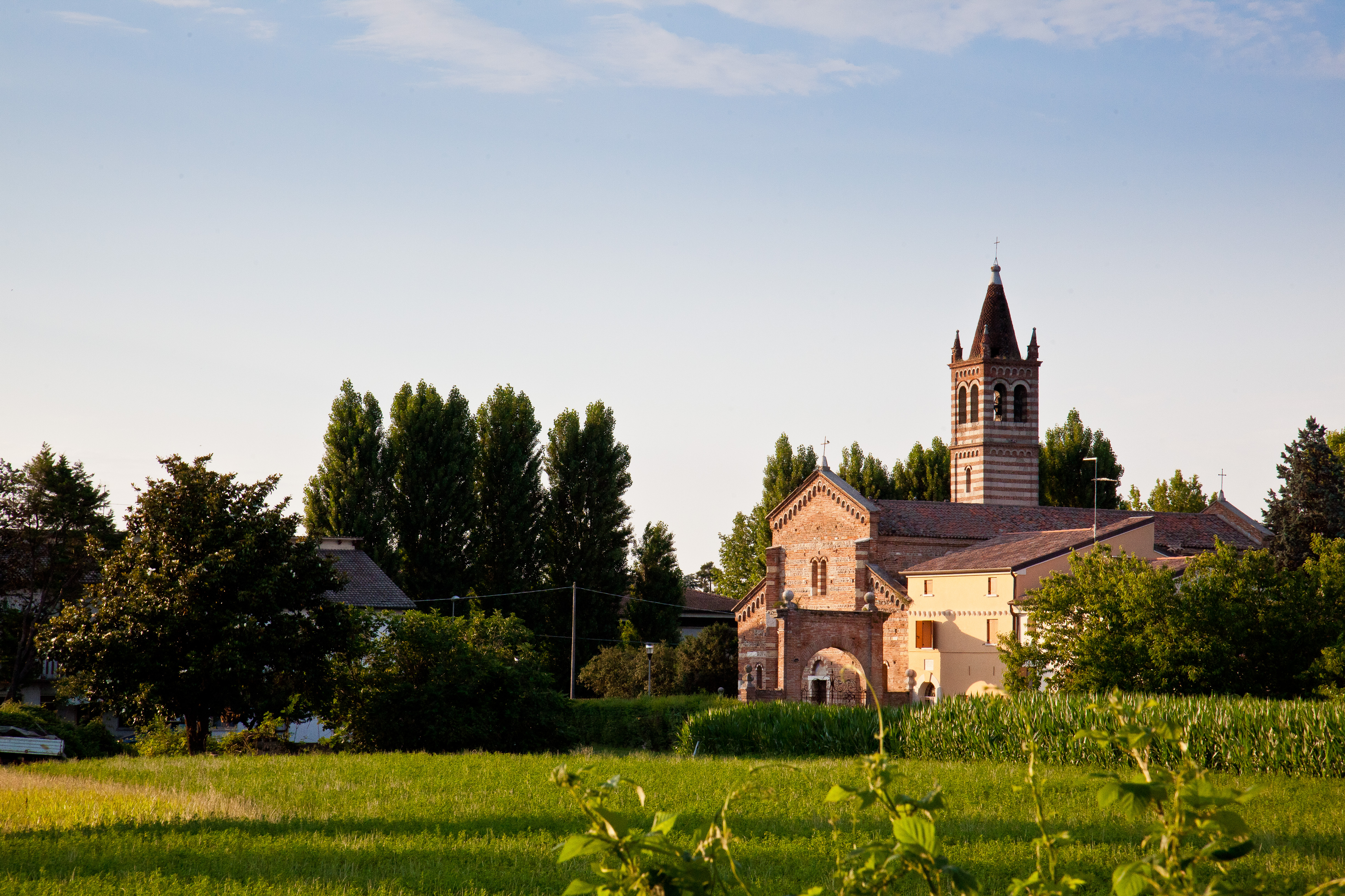 Chiesa romanica di San Salvaro al tramonto, immersa nei campi